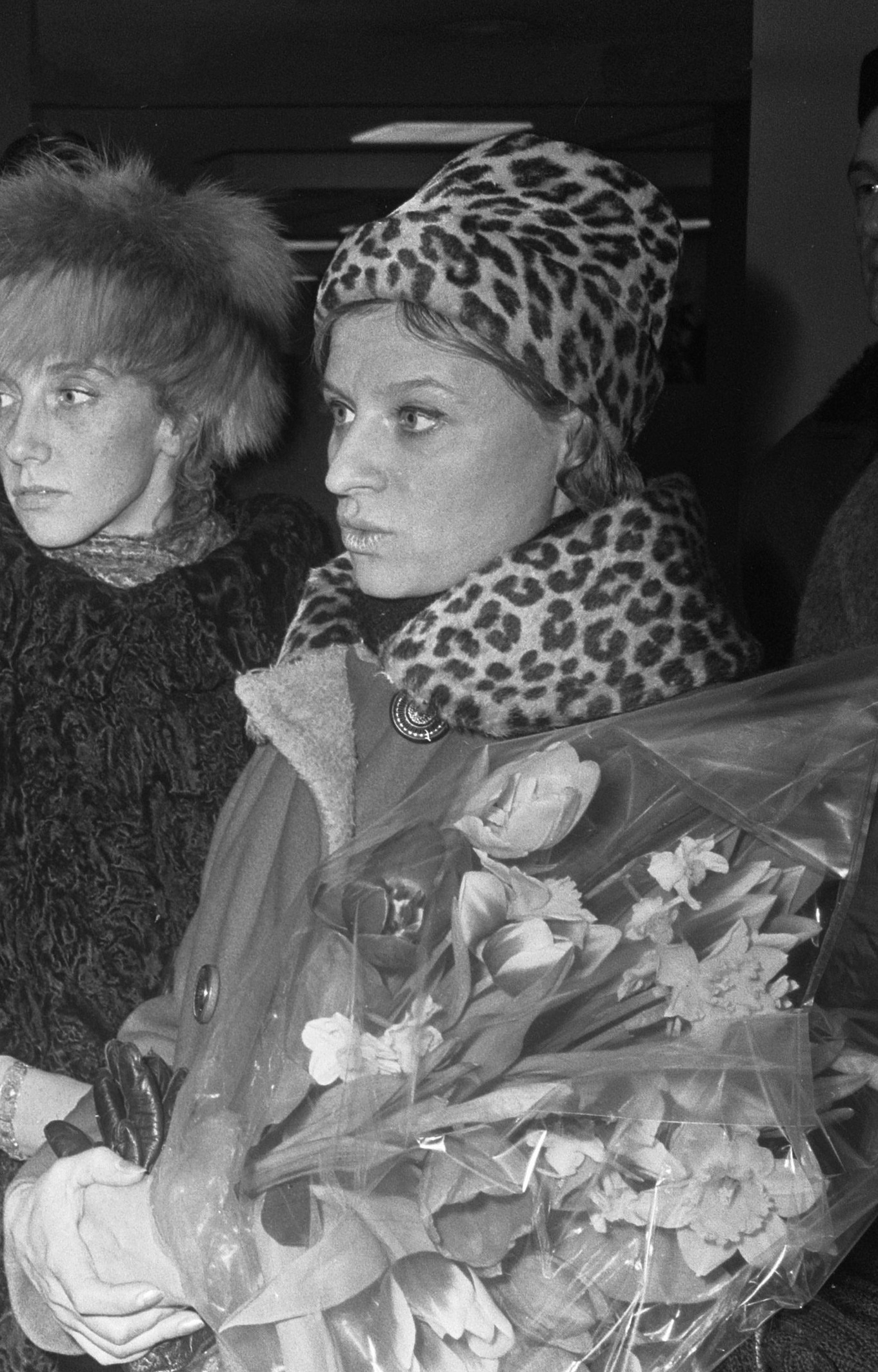 Aankomst Russisch topballet op Schiphol, Ludmilla Bogomolova